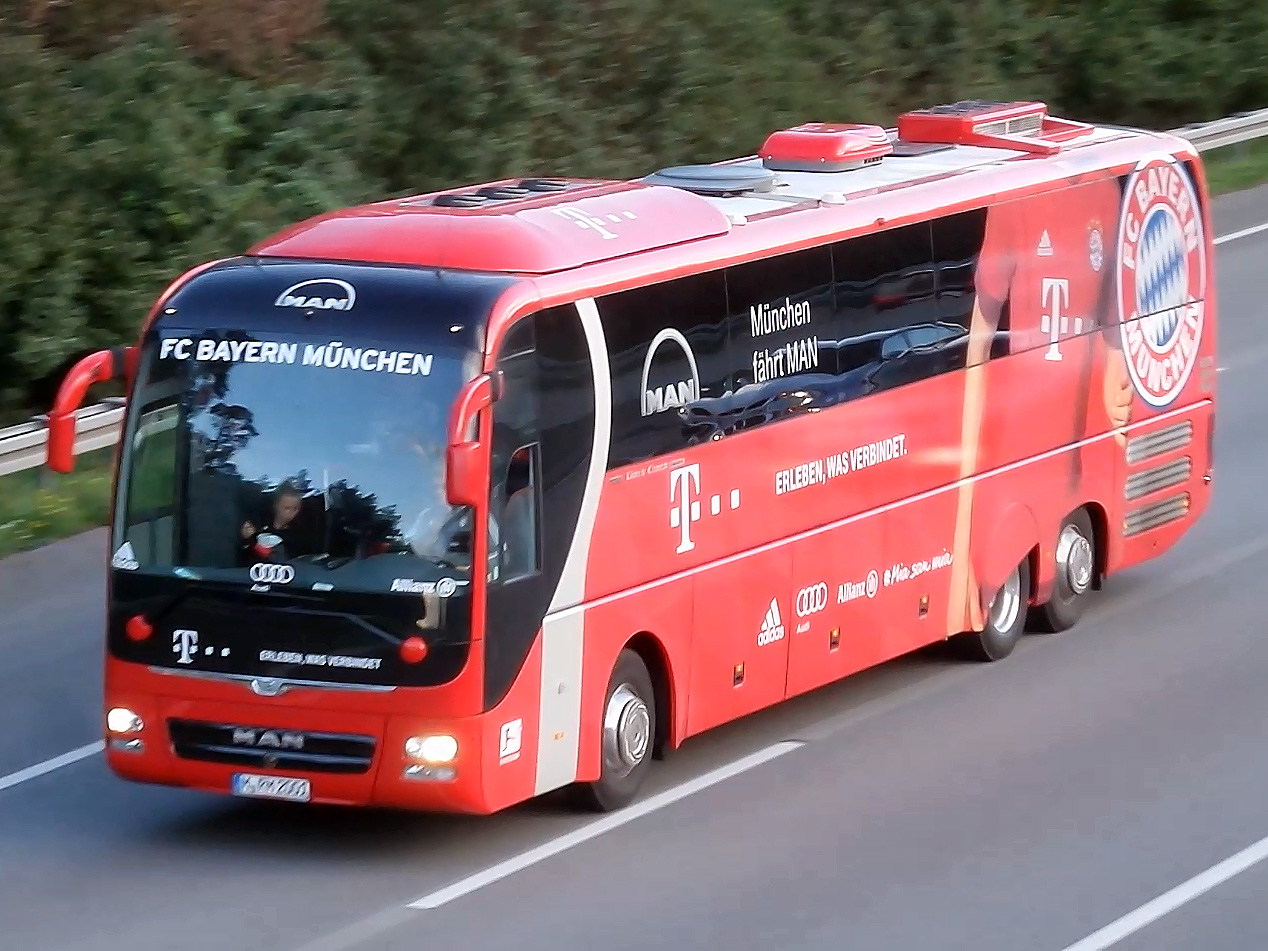 Mannschaftsbus des FC Bayern München nach dem Spiel gegen den SV Darmstadt 98 auf der A5 in Richtung Flughafen Frankfurt